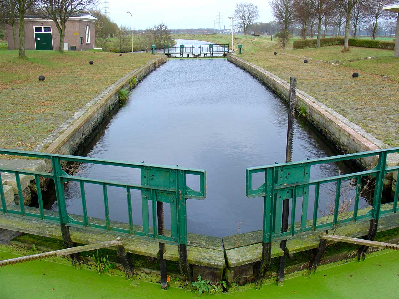 Linthorst Homankanaal tussen Makkum en Terhorst